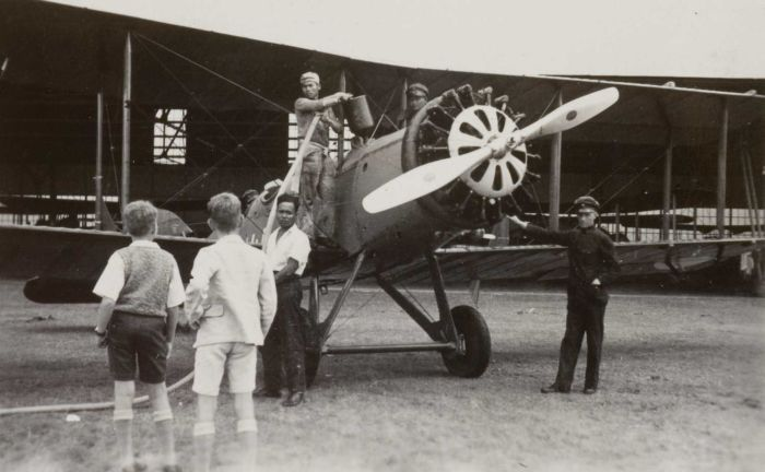 Foto. De broers Henk en Hans Japing bij een vliegtuig op het militaire vliegveld Andir bij Bandoeng